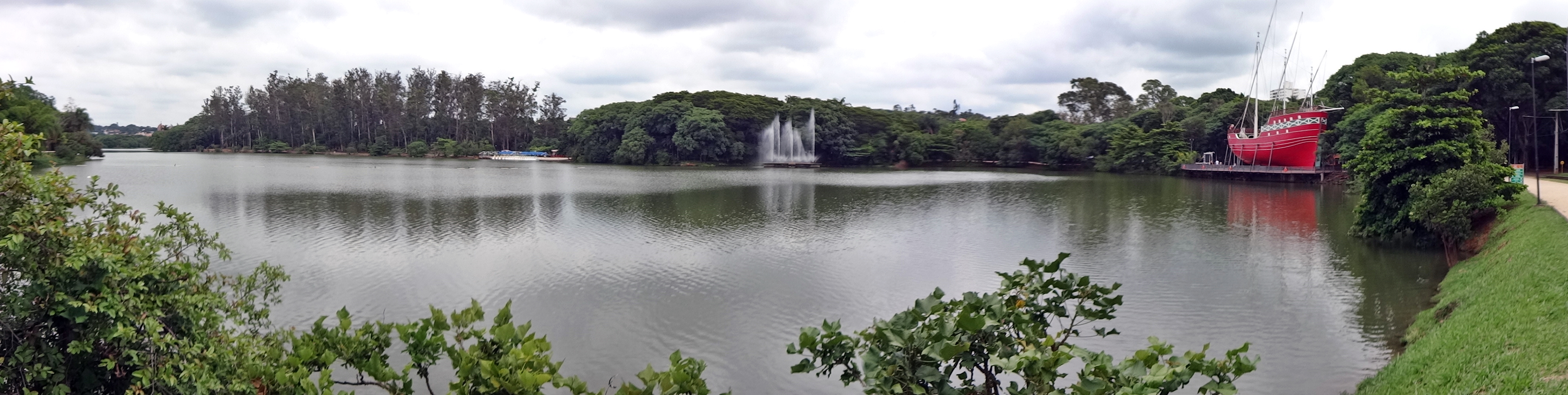 Lagoa Isaura Teles Alves de Lima, no Parque Portugal (Lagoa do Taquaral) em Campinas/SP